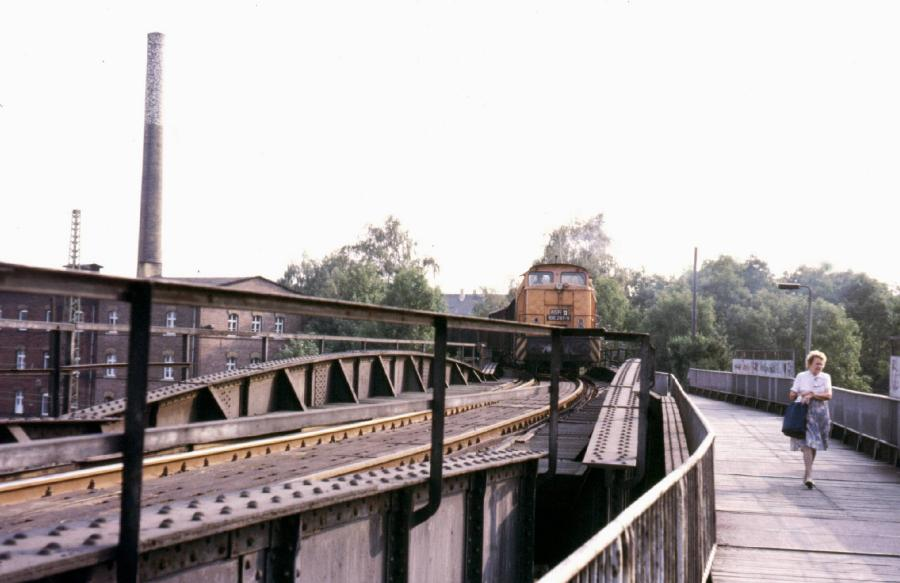 Eine V60 der DR auf der Industriebahn Leipzig-Plagwitz - Leipzig-Lindenau